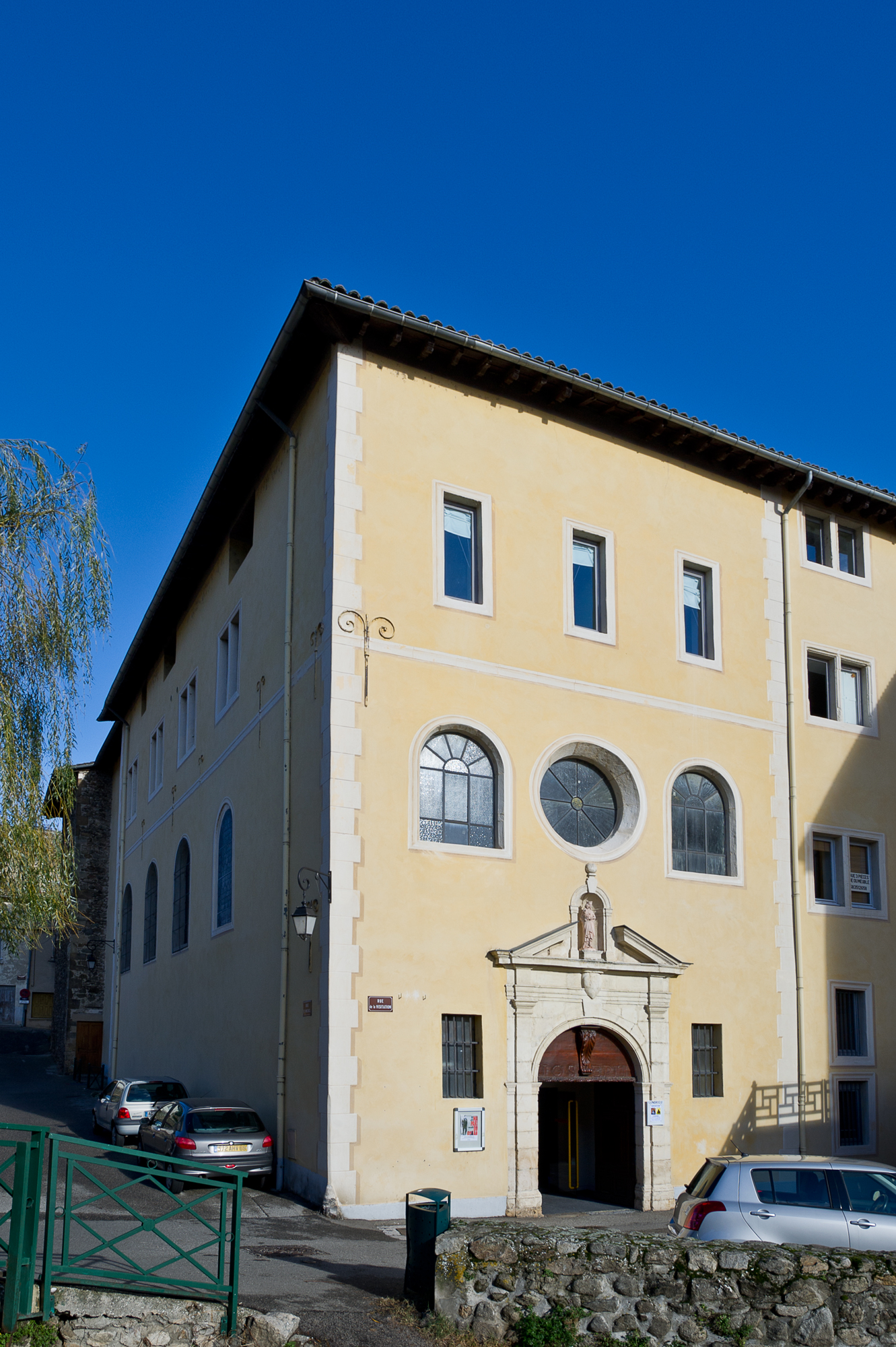 Couvent de la Visitation de Condrieu, Rue de Belfort (Inscrit, 1988) .